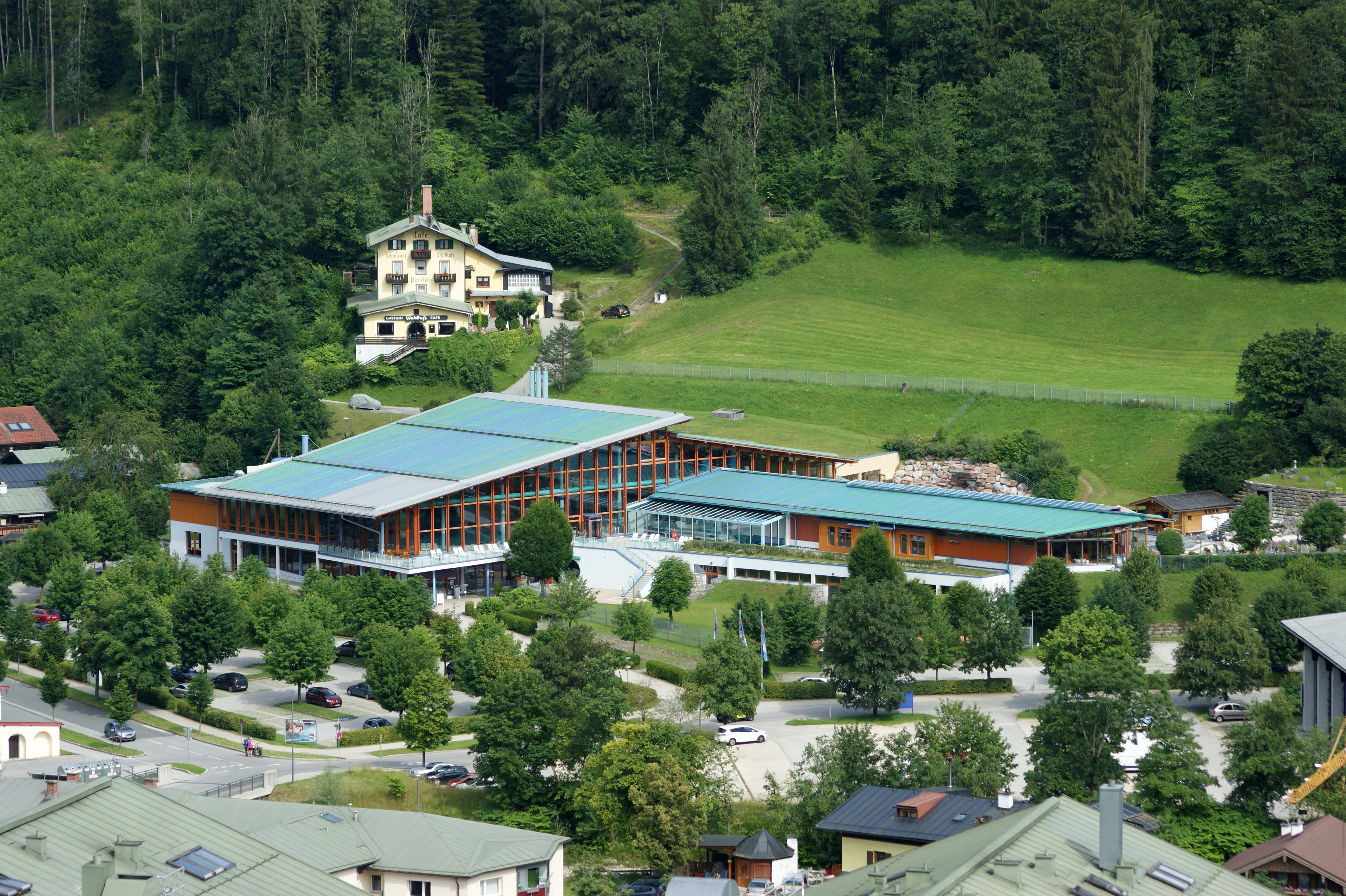 aufgenommen unterhalb der Kirchleitn Kapelle in Berchtesgaden